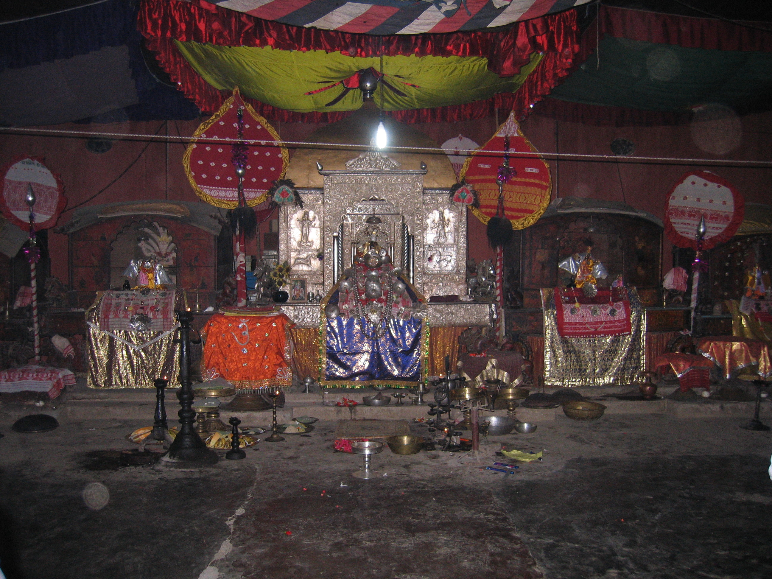 From a Satra on Majuli